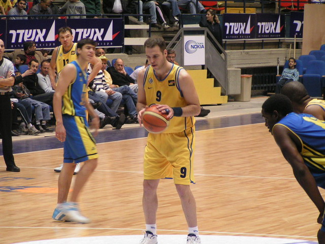 גור שלף